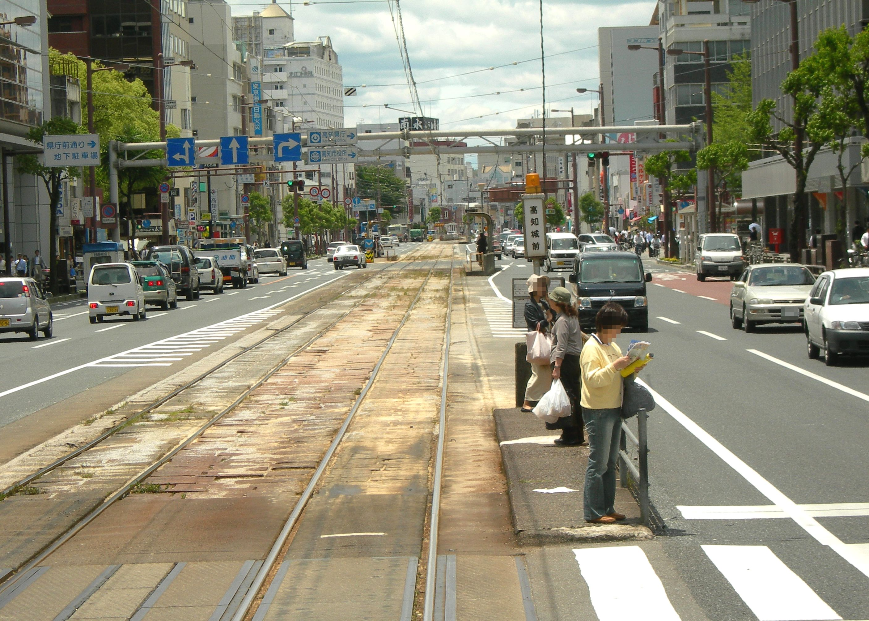 土佐電気鉄道・高知城前電停